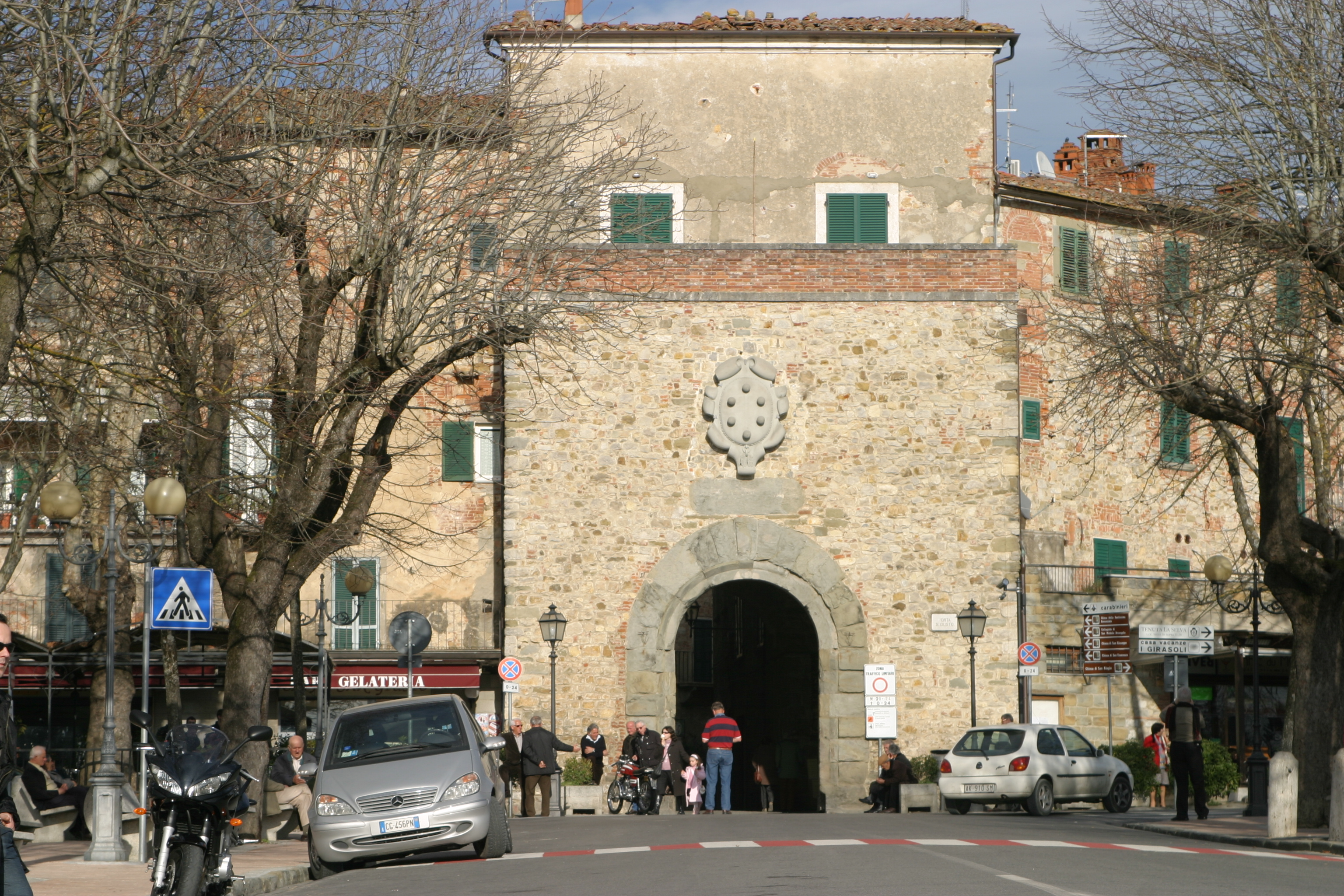 Lucignano, Porta San Giusto (Arezzo, Tuscany, Italy)